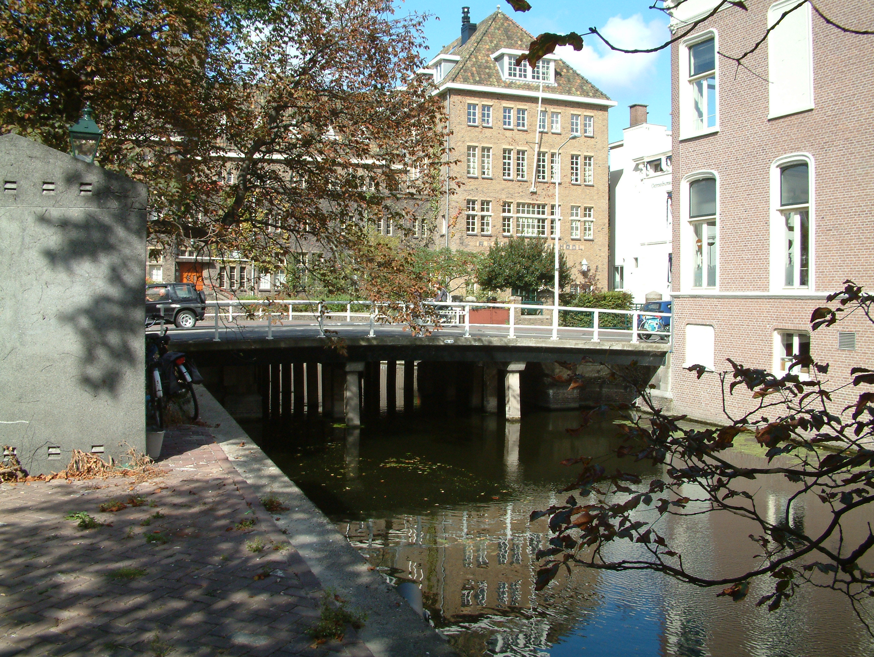 Brug in Den Haag